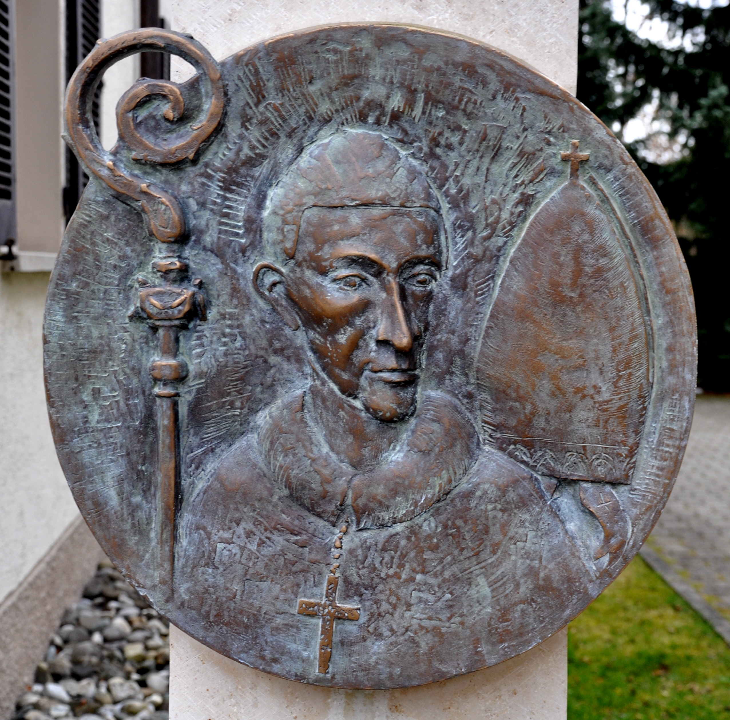 Schömberg (Zollernalbkreis), Caspar-Oechsle-Platz (vor dem Pfarrhaus), Denkmal für Caspar Oechsle